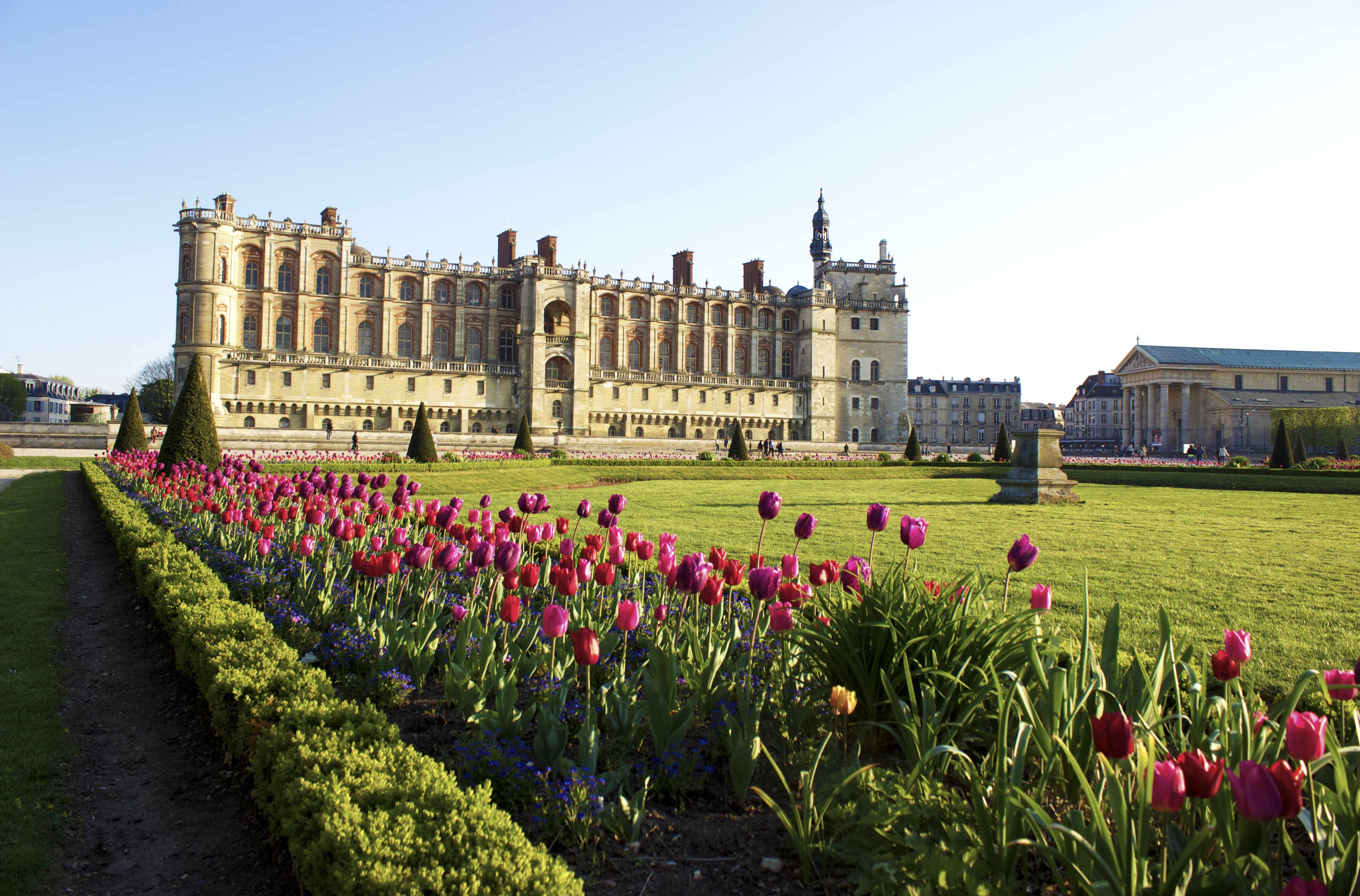 Tulipes du château de Saint-Germain-en-Laye